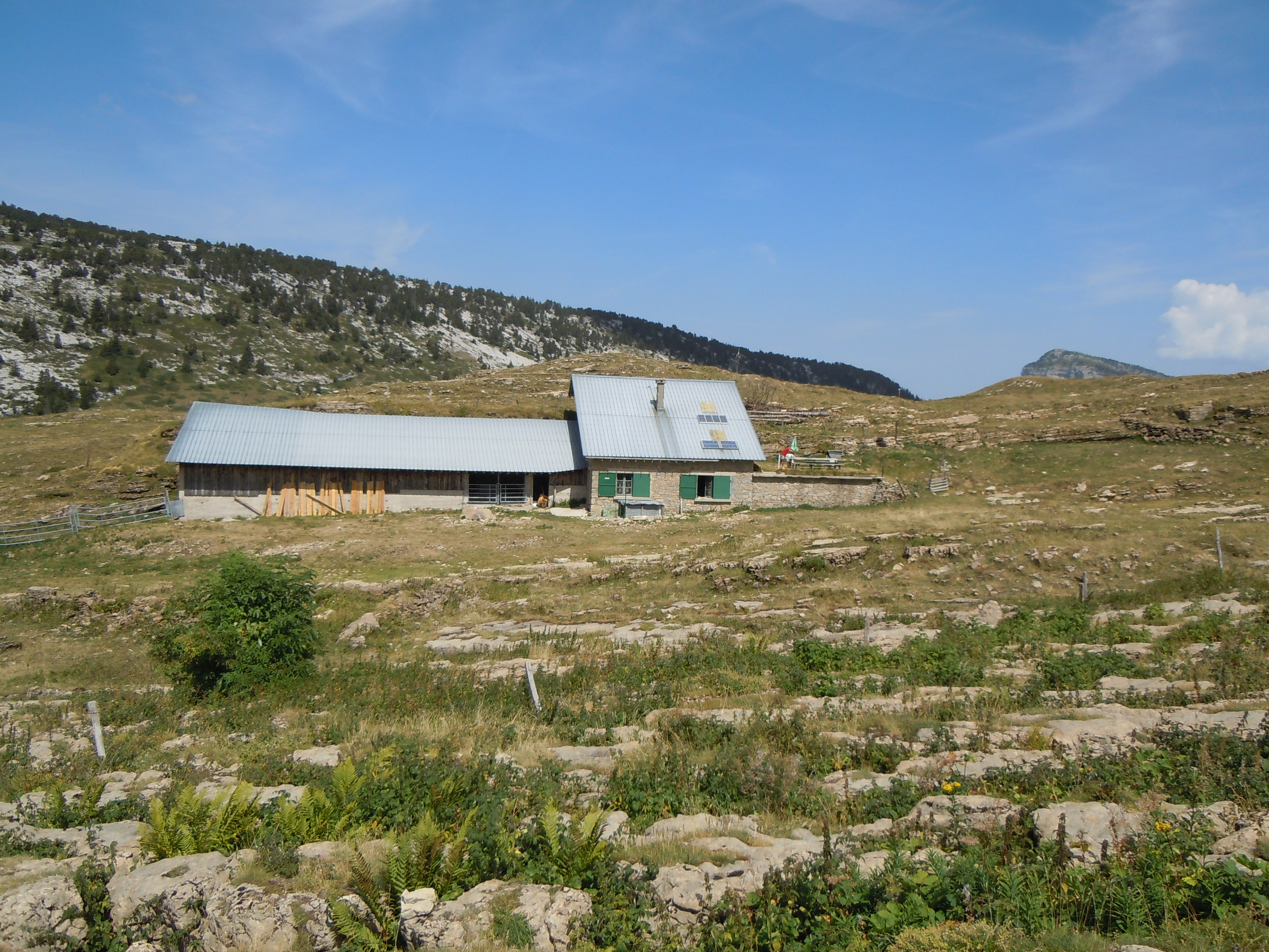 Habert de Saint-Vincent - Réserve naturelle des Hauts de Chartreuse